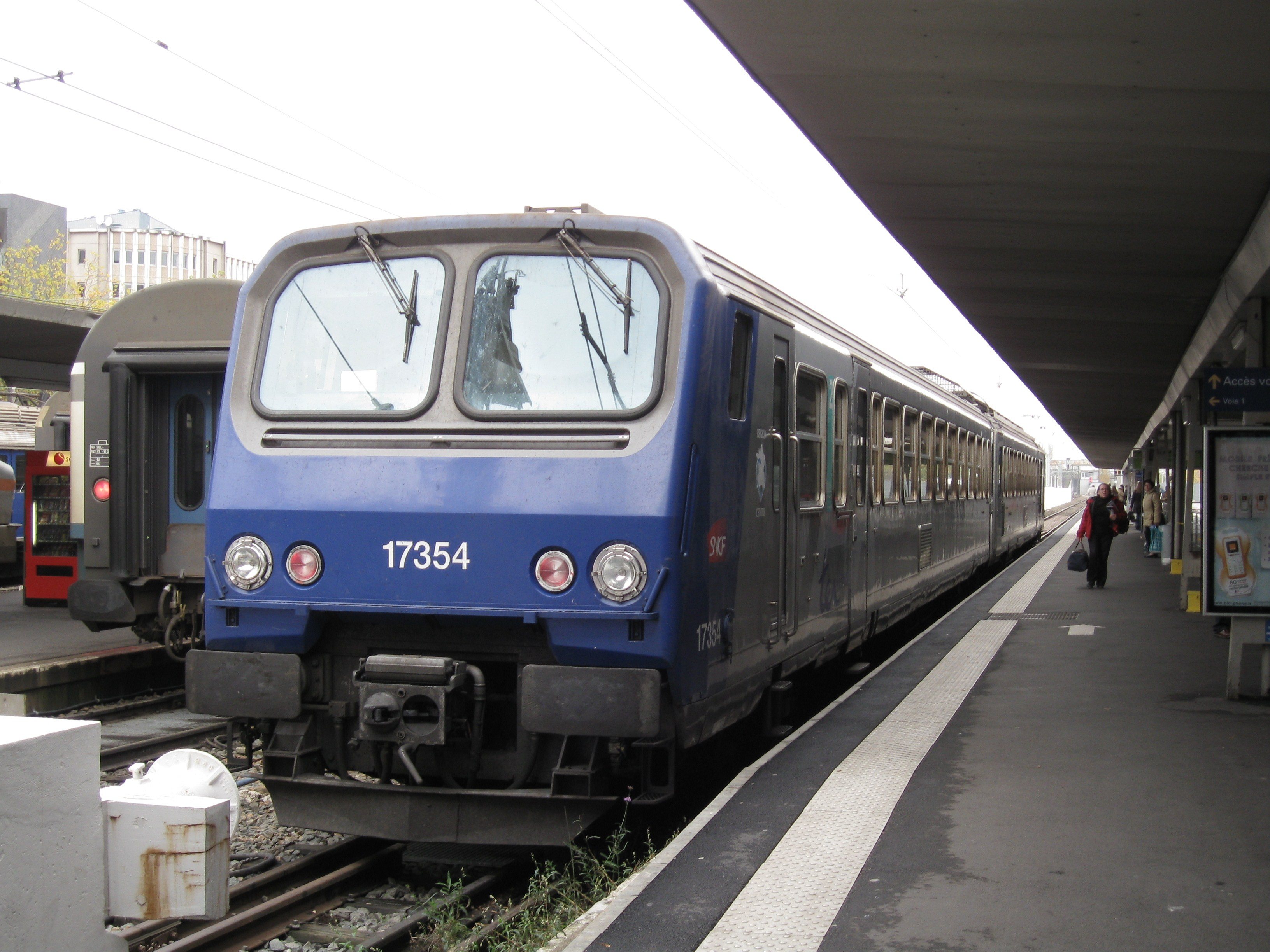 Automotrice Z 17354 (TER Centre), en gare d'Orléans, Loiret, France